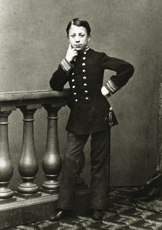 Książę Józef Maria Sułkowski z okresu pobytu w wiedeńskim Theresianum.